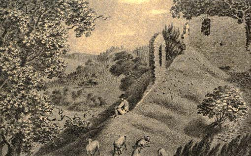 Karl Johann Emanuel von Ungern-Sternbergi (1773–1830) maal Augstroze linnusemäelt Lätis.